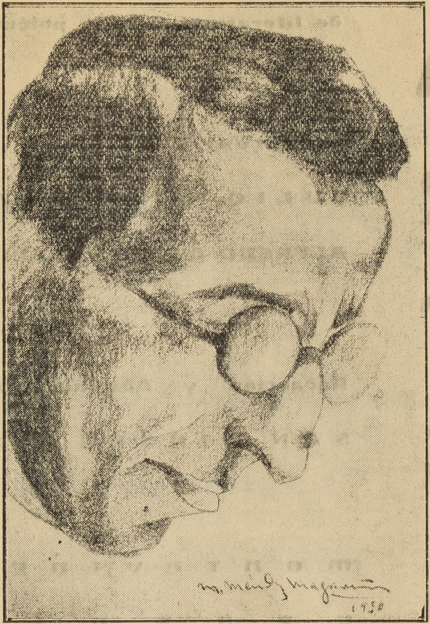 Caricatura del escritor gallego Julio Sigüenza hecha por el dibujante uruguayo M. Mendez Magariños aparecida en el libro de poemas "Cuaderno del ojo sin sueño" de Sigüenza, publicado en Uruguay.